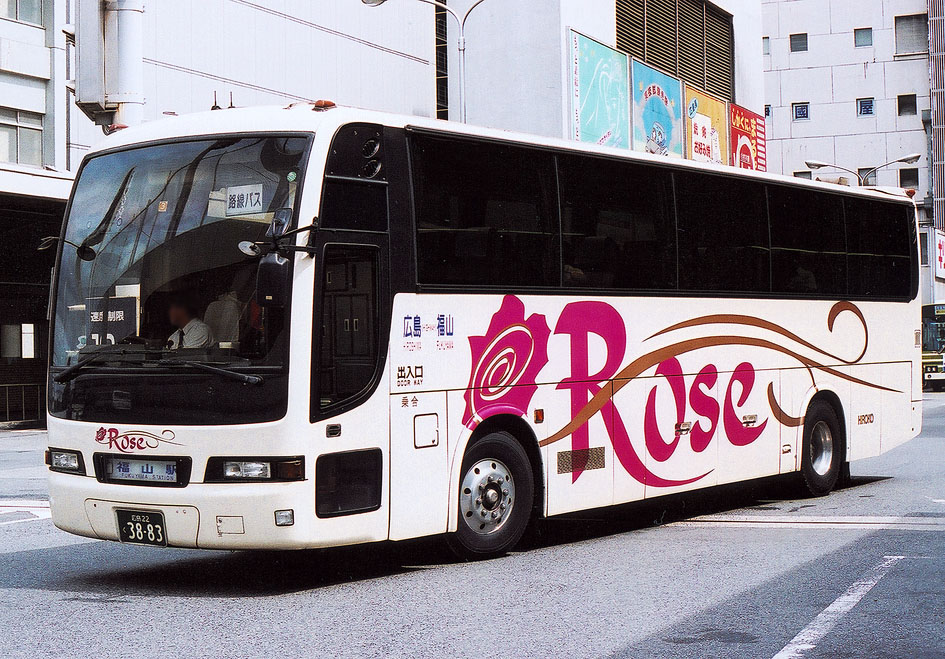 広島交通 日産ディーゼル U-RA530RBN 西工92MC SD-II